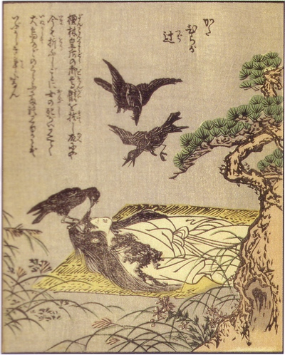 Katabiragatsuji (帷子辻) from the Ehon Hyaku monogatari (絵本百物語)